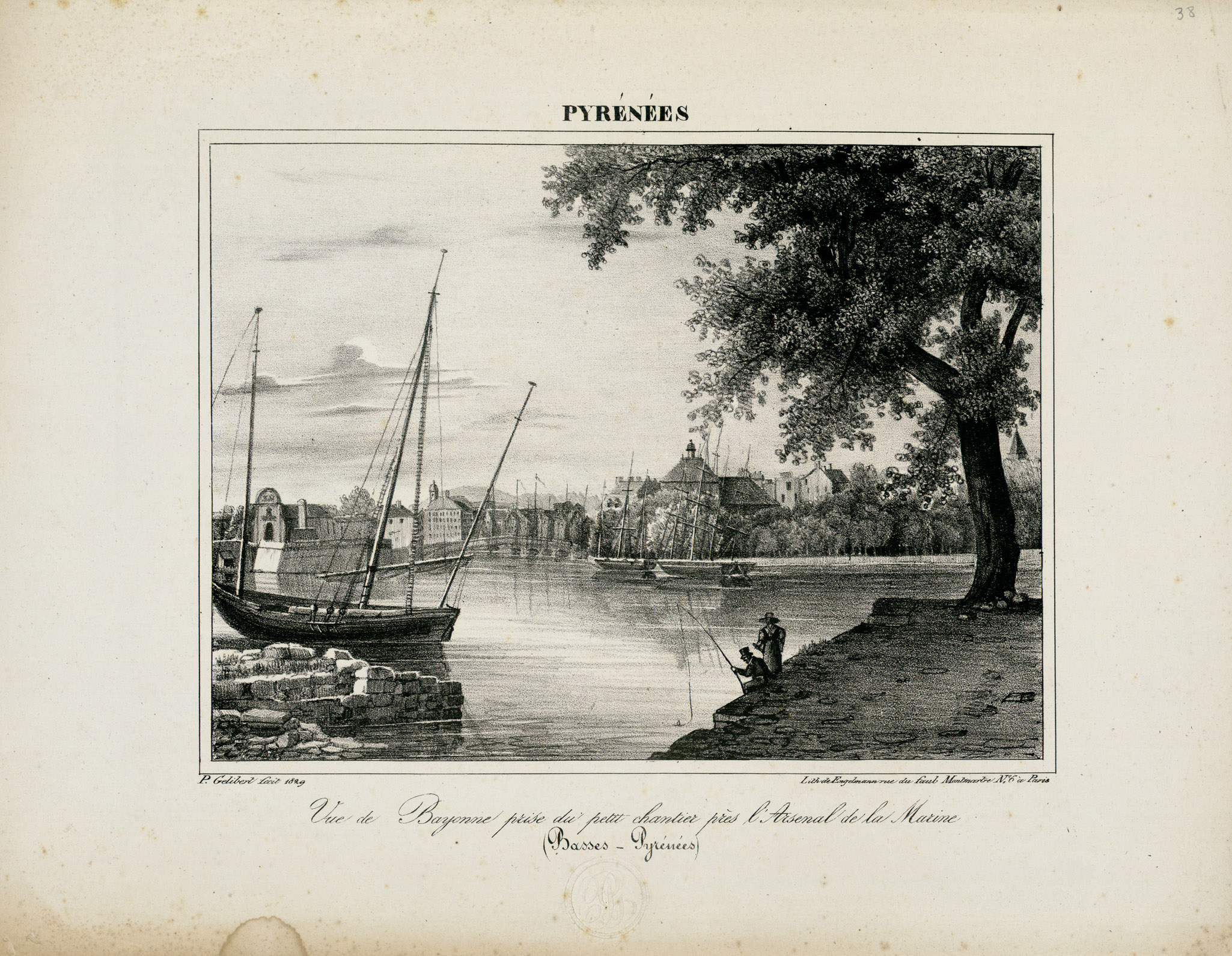 Fait partie d'une série de 42 pl. de Gélibert sur les Pyrénées. Pl. 1 à 11 lith. par Légé (Bordeaux). Pl. 11 à 42 lith. par Engelmann (Paris). Ancely, René (1876 - 1966). Possesseur